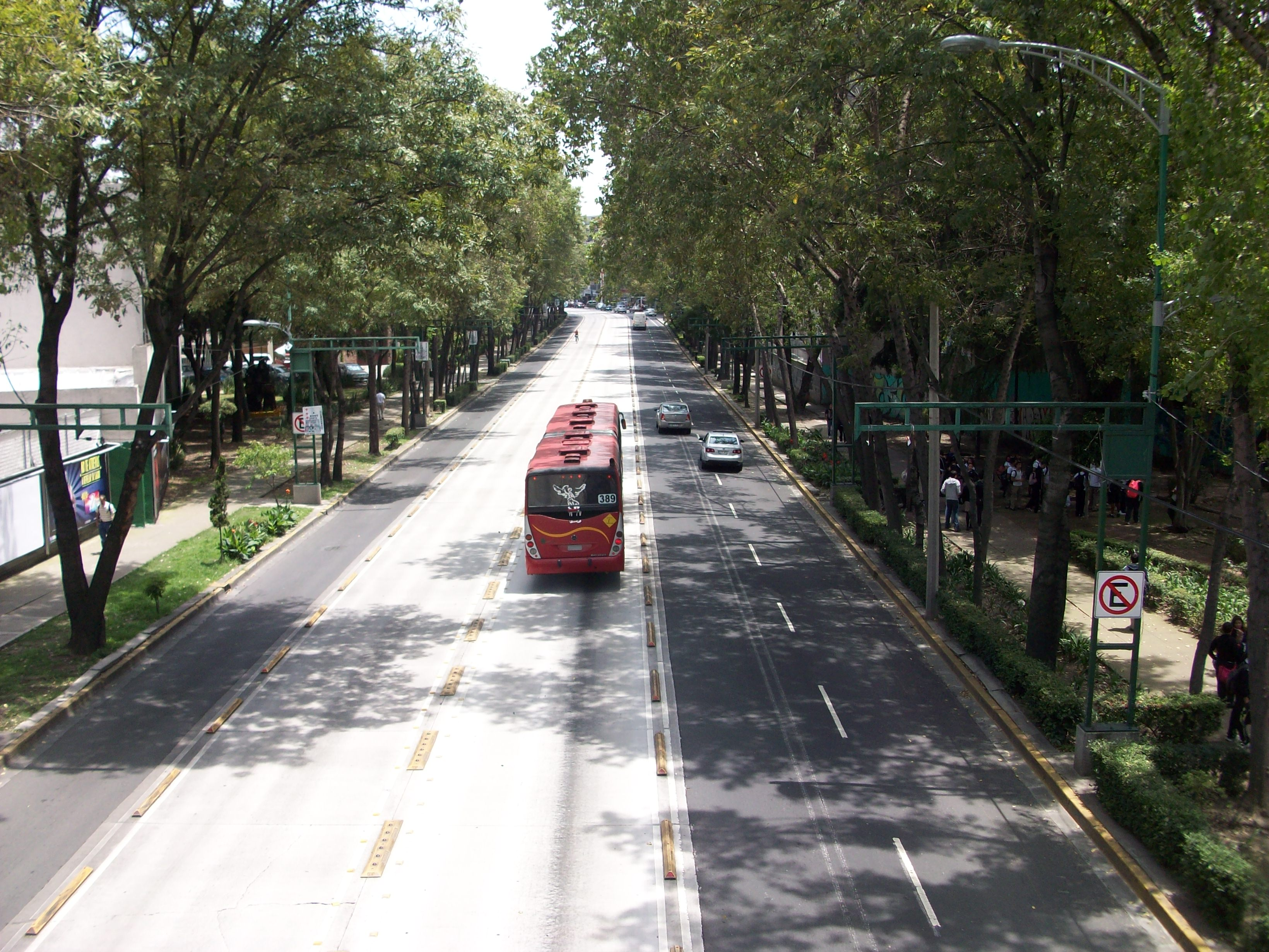 Eje 4 Sur Rafael Donde